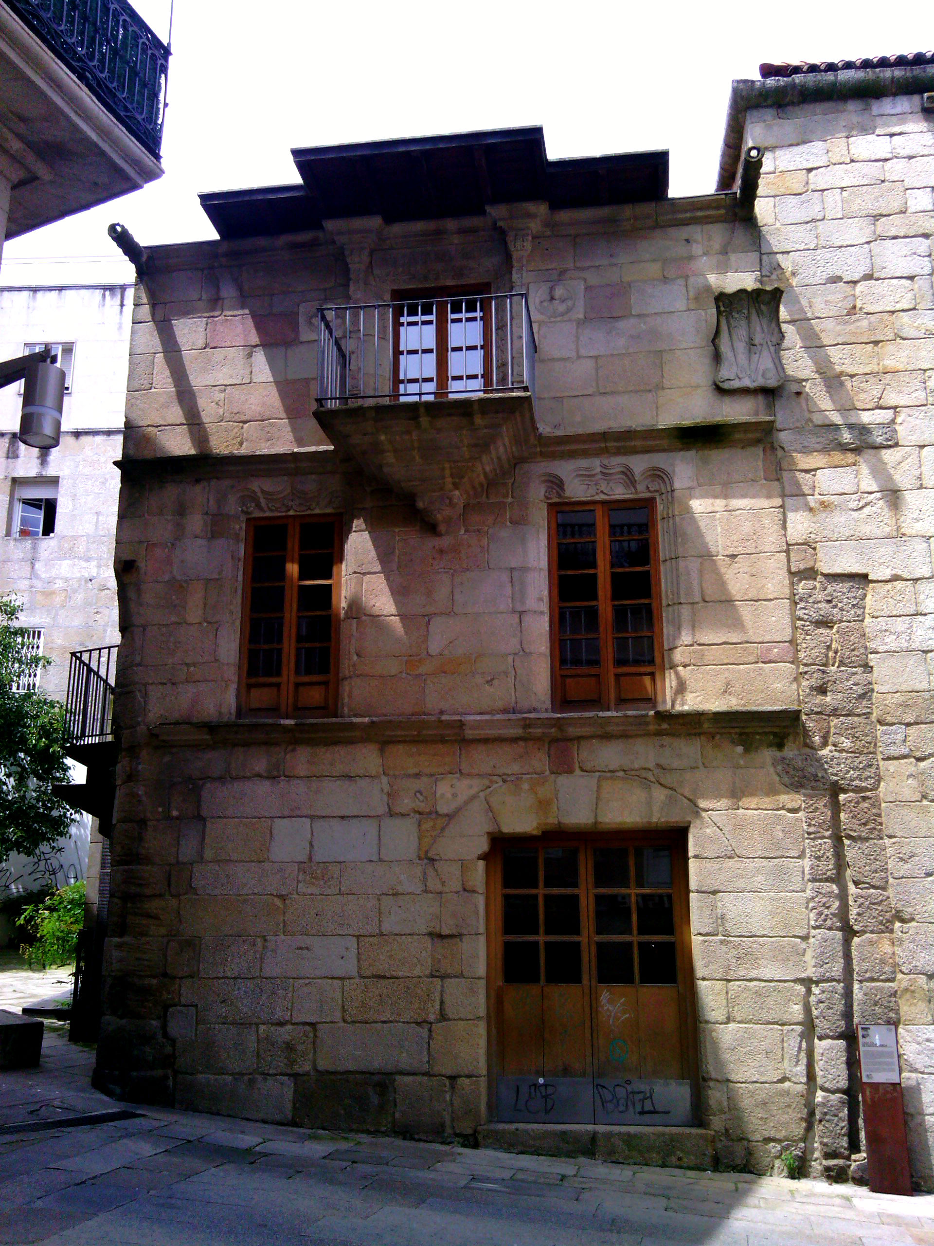 Fachada principal de la casa